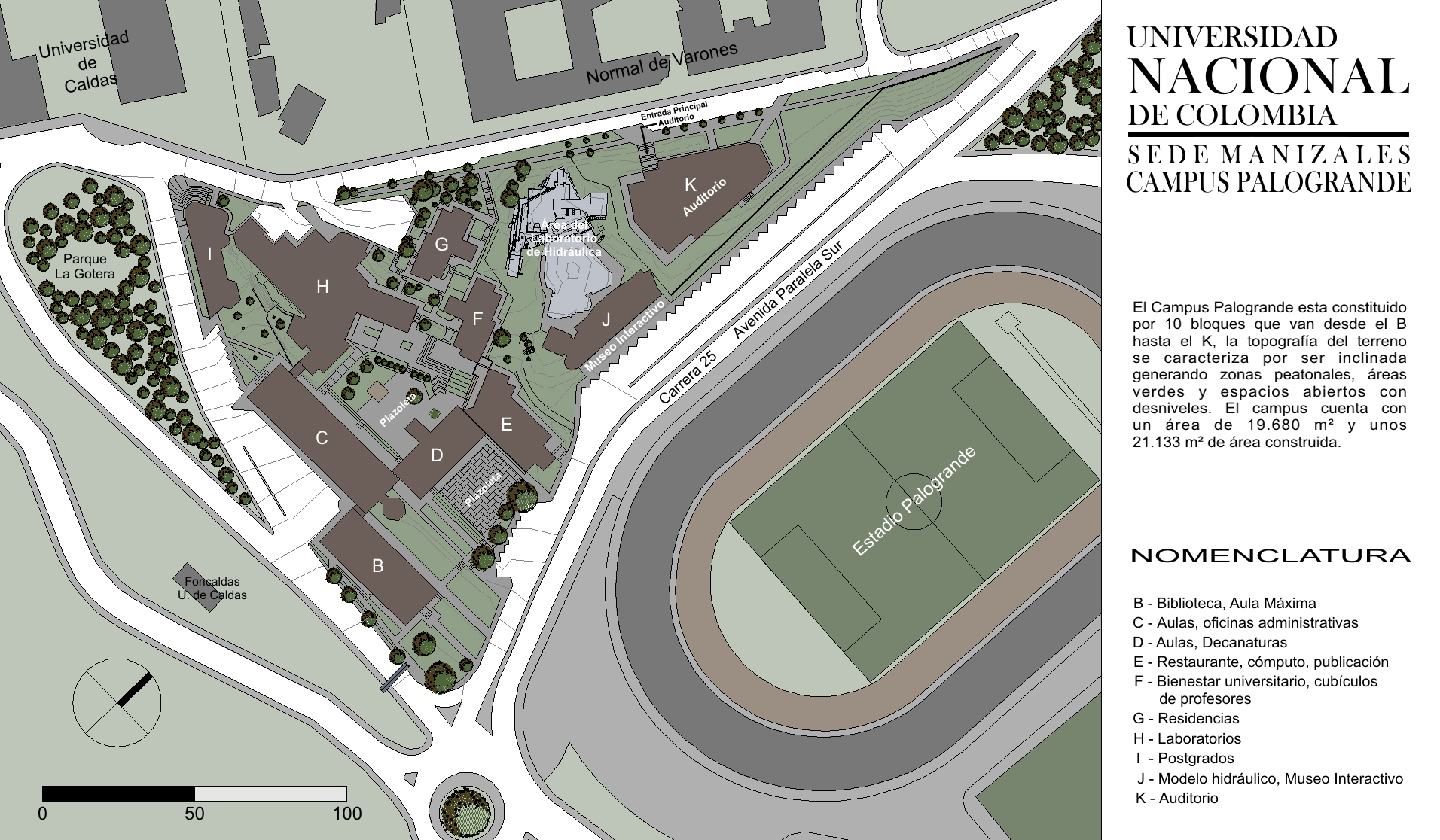 Plano de la Universidad Nacional de Colombia sede Manizales, Campus Palogrande. El mapa esta basado en planos oficiales, si contiene algún error, favor notifíquelo en mi página de usuario, en la sección discusión.